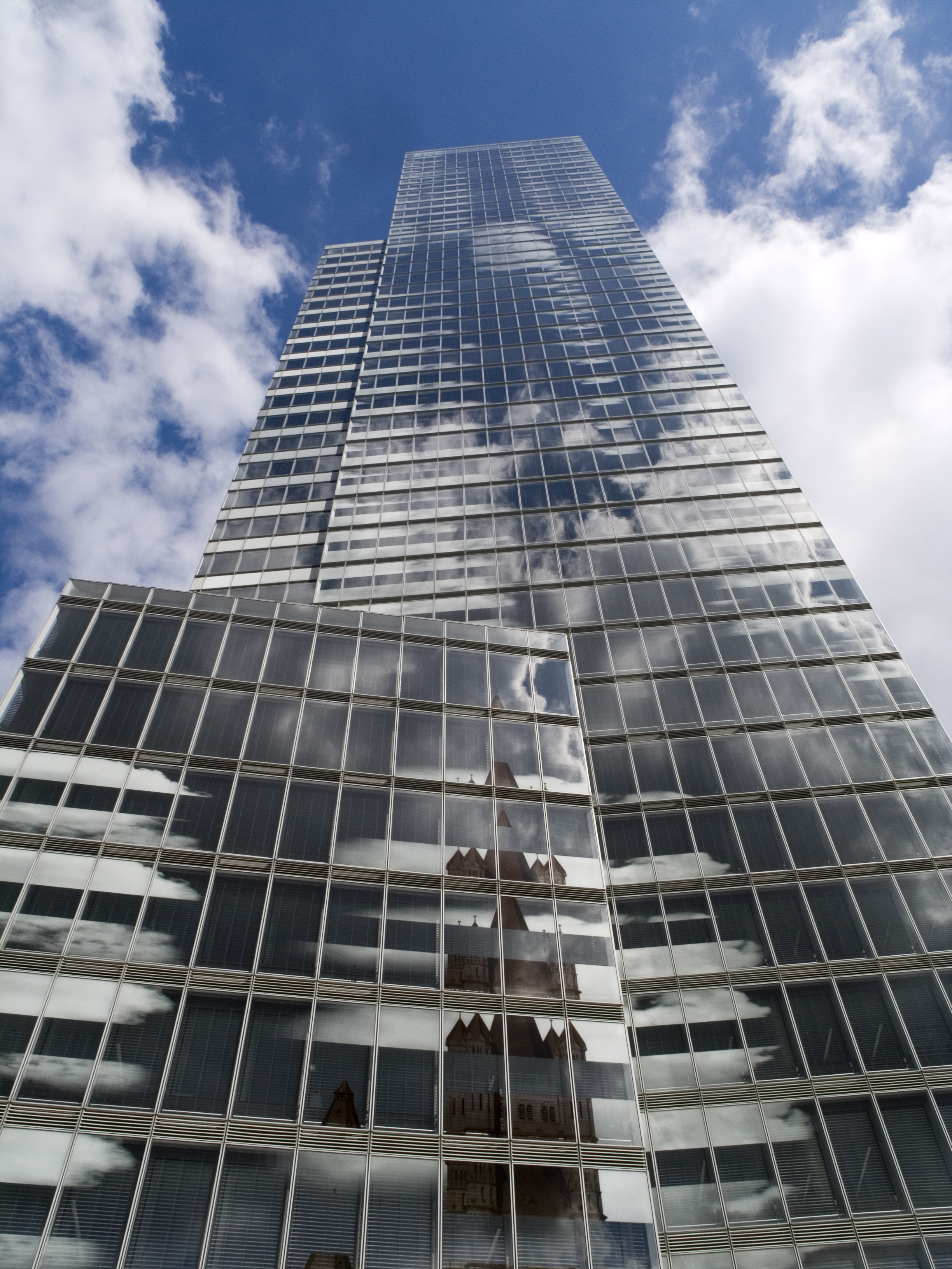 Северный Рейн - Вестфалия, Кёльн - Высотное здание Kölnturm